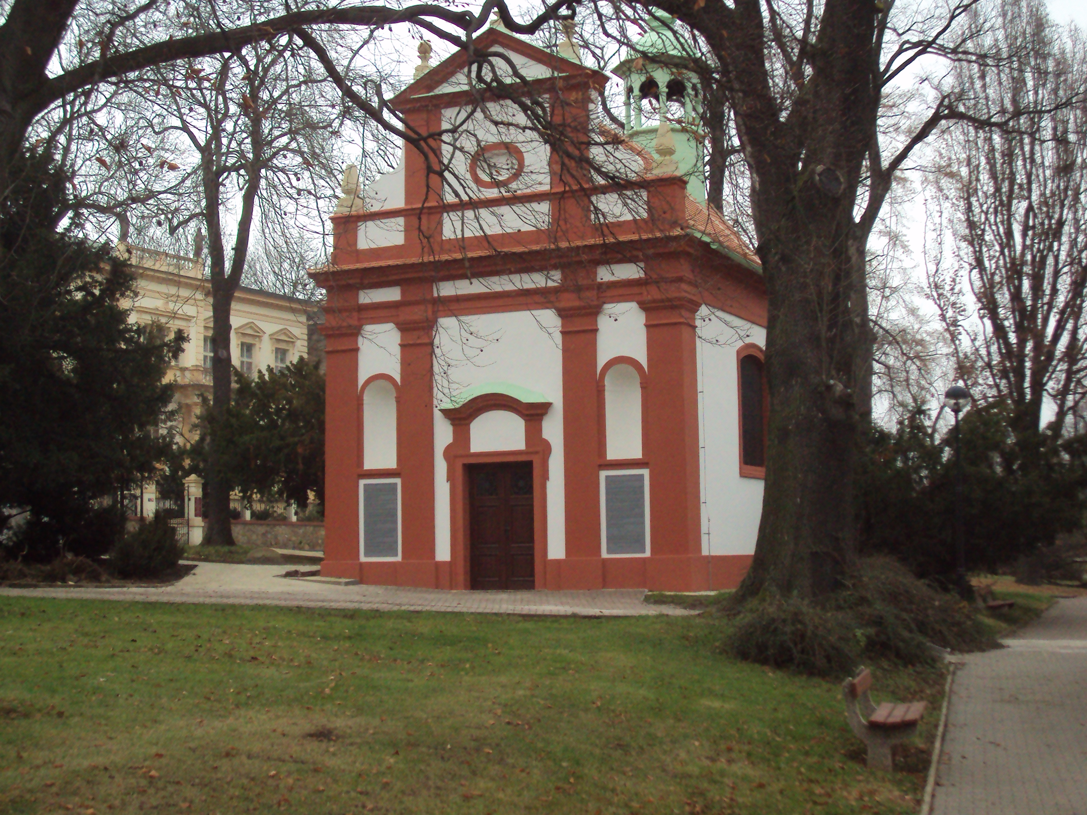 Kaple v Teplicích po loňské rekonstrukci